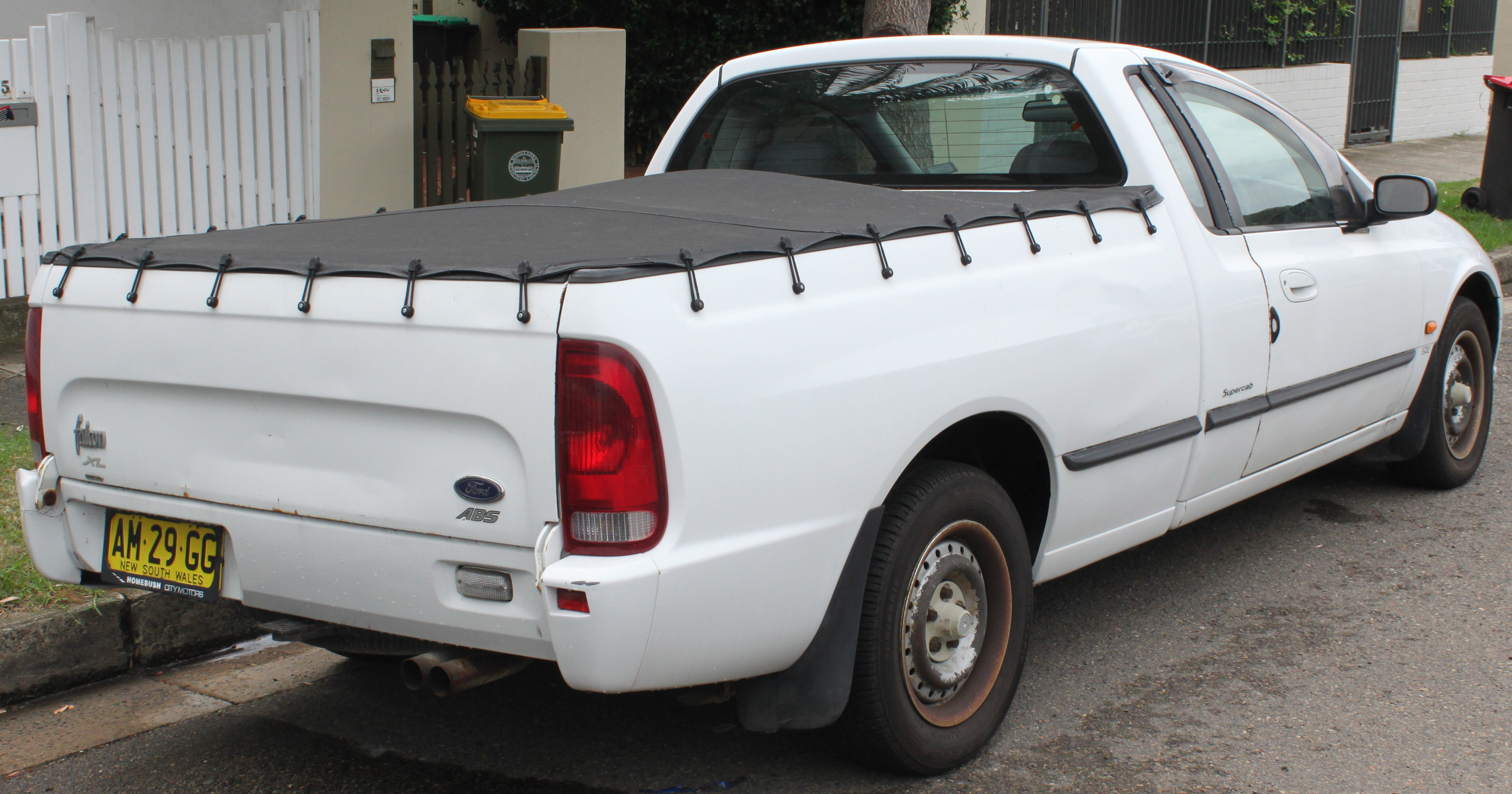 Ford Falcon AU XL Supercab Ute